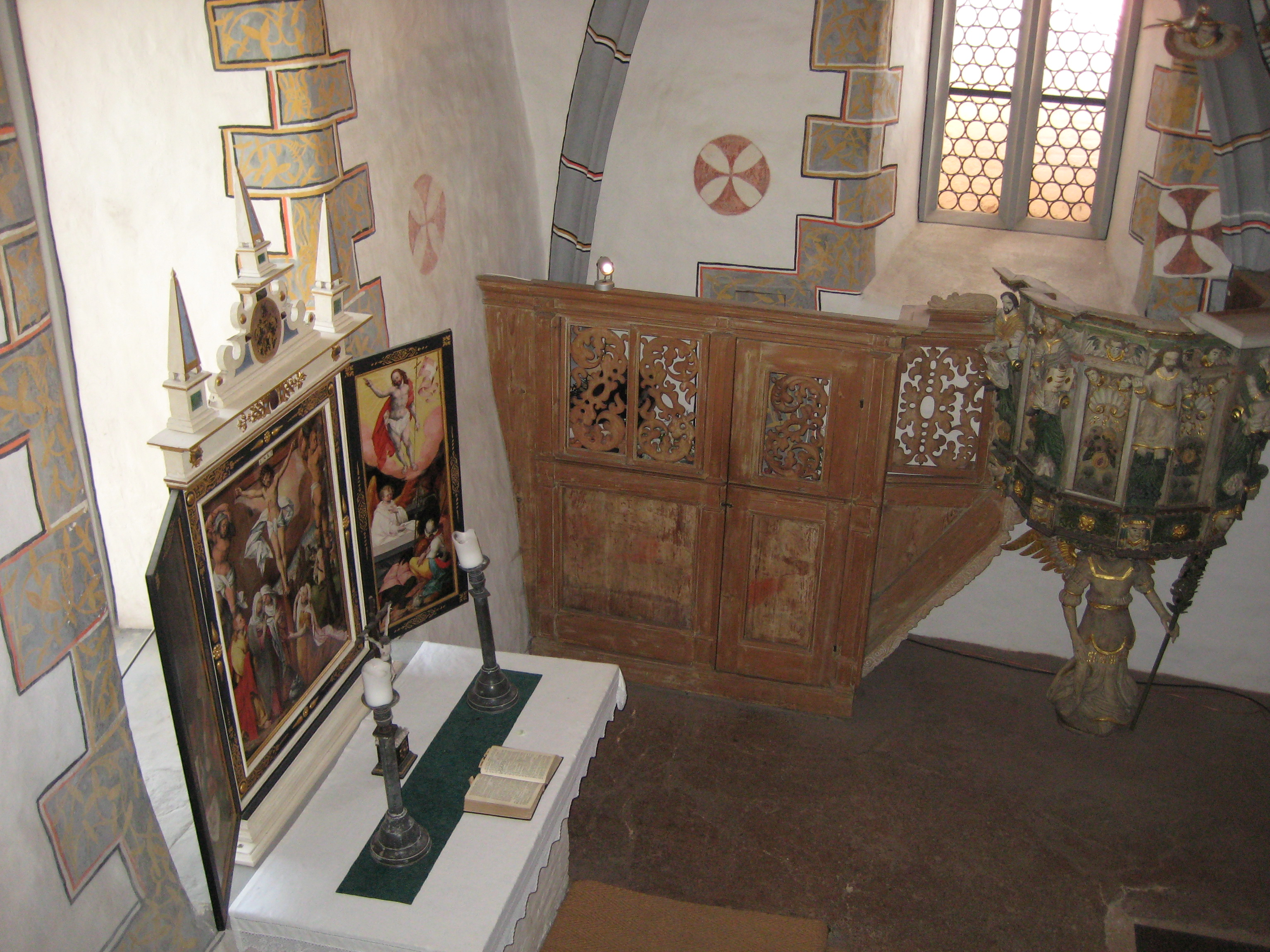 Die Kapelle der Burg Schönfels in Schönfels (Lichtentanne), Sachsen.